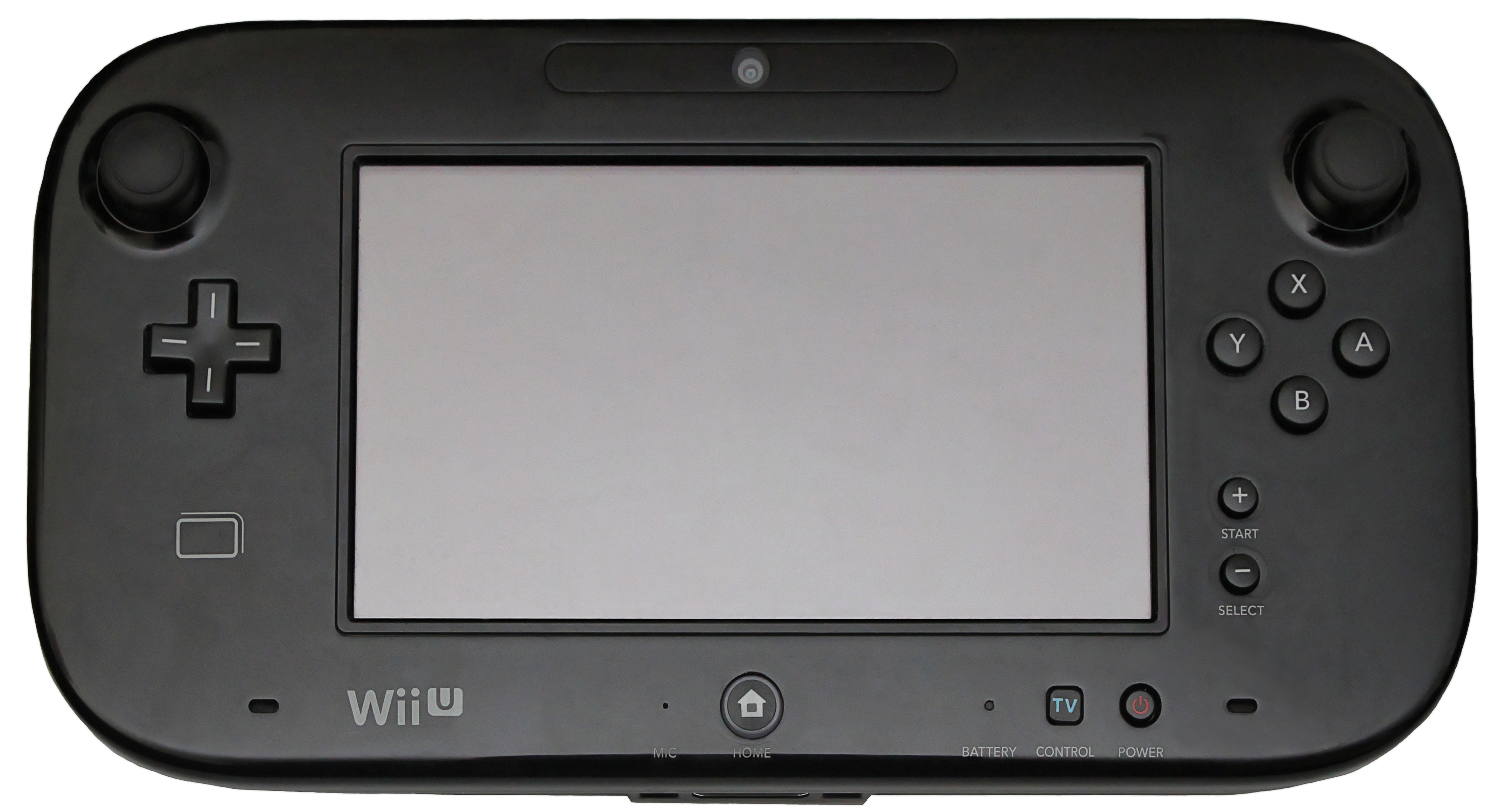 schwarzes Wii U-Gamepad des Premium Packs